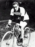 Philippe Thys (né le 8 octobre 1890 à Anderlecht et mort le 16 janvier 1971 à Bruxelles) est un cycliste belge